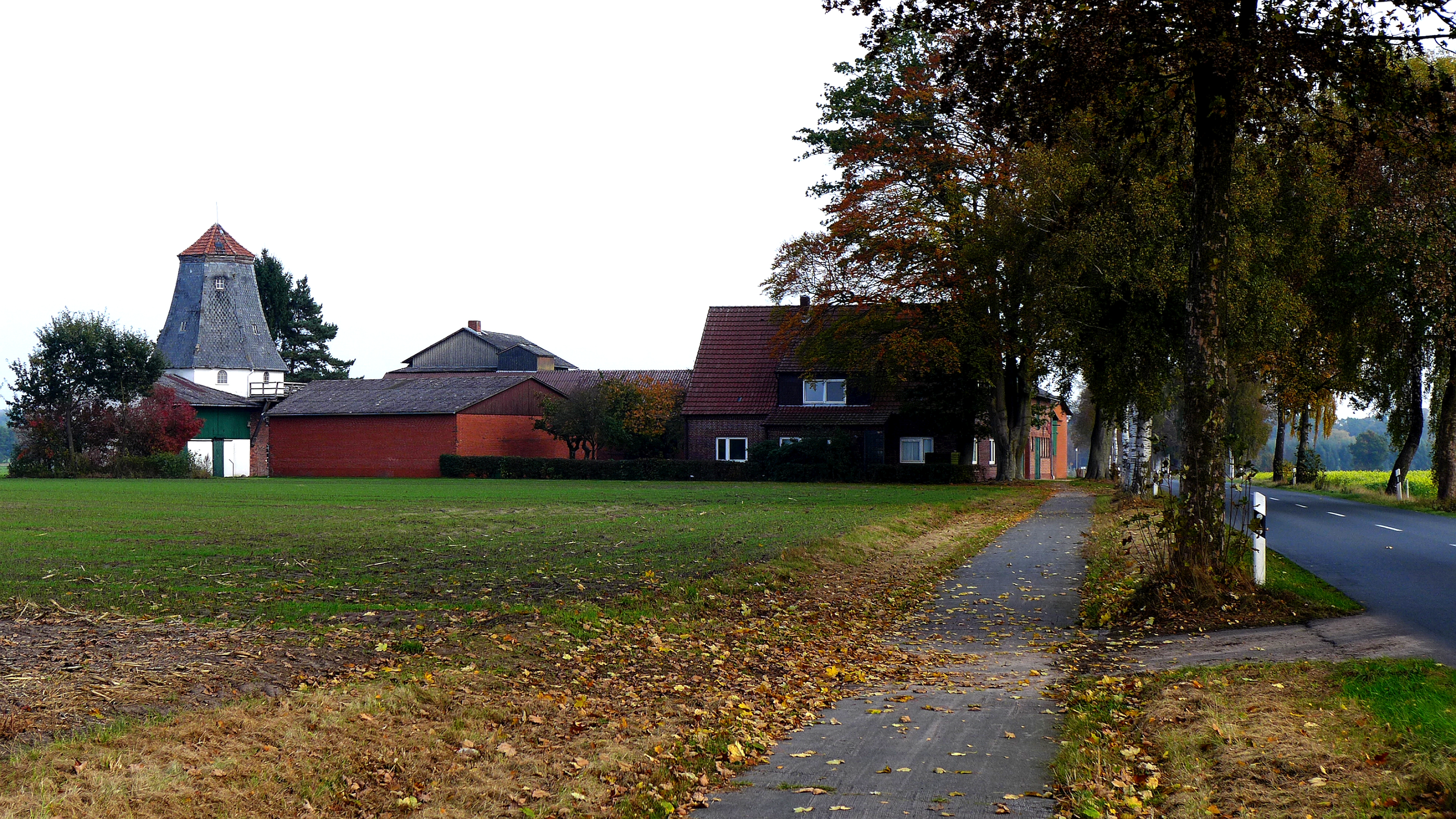 Als Gallerie-Holländer erbaut um 1874 in Westervesede, einem Ortsteil von Scheeßel. In 1946 riss ein schwerer Sturm den Mühlenkopf samt Flügeln ab. Eine Reparatur war nicht möglich, deshalb Umrüstung auf Strombetrieb. Aufgabe des Mühlenbetriebes in 1985. Mühle unter Denkmalschutz seit 2005. Aufnahmedatum 2016-10.